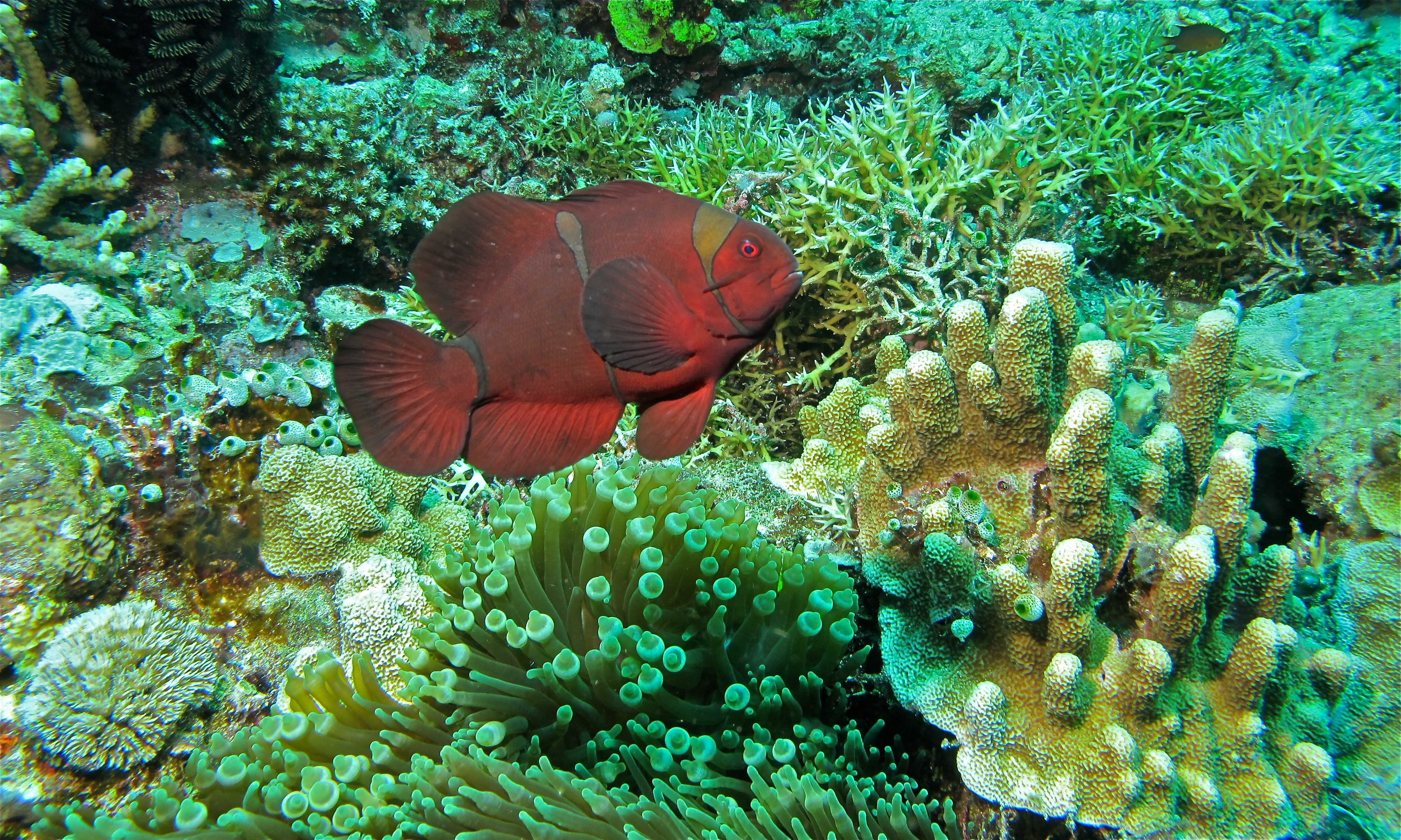 Negeri, Bunaken Island, Sulawesi, INDONESIA